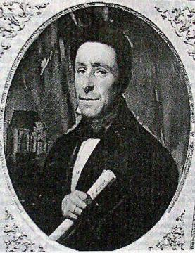 Gravure du milieu du XIXe siècle représentant le portrait de Jean-Pierre Garreau (1803-1896), entrepreneur en bâtiment et architecte français.